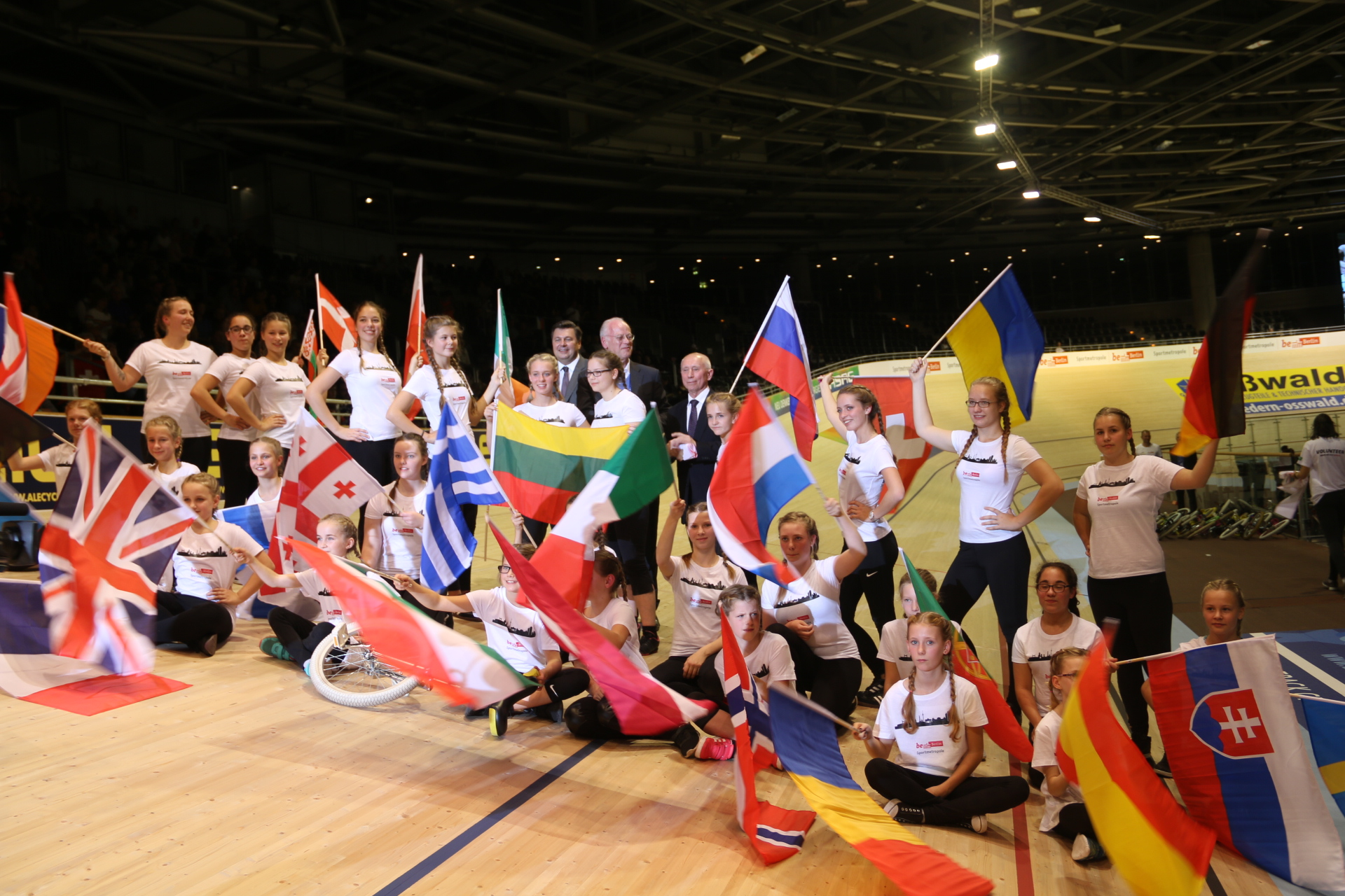 Eröffnung EM, Einradfahrer und Andreas Geisel, Rudolf Scharping, Alexander Michailowitsch Gusjatnikow (v.l.n.r.)